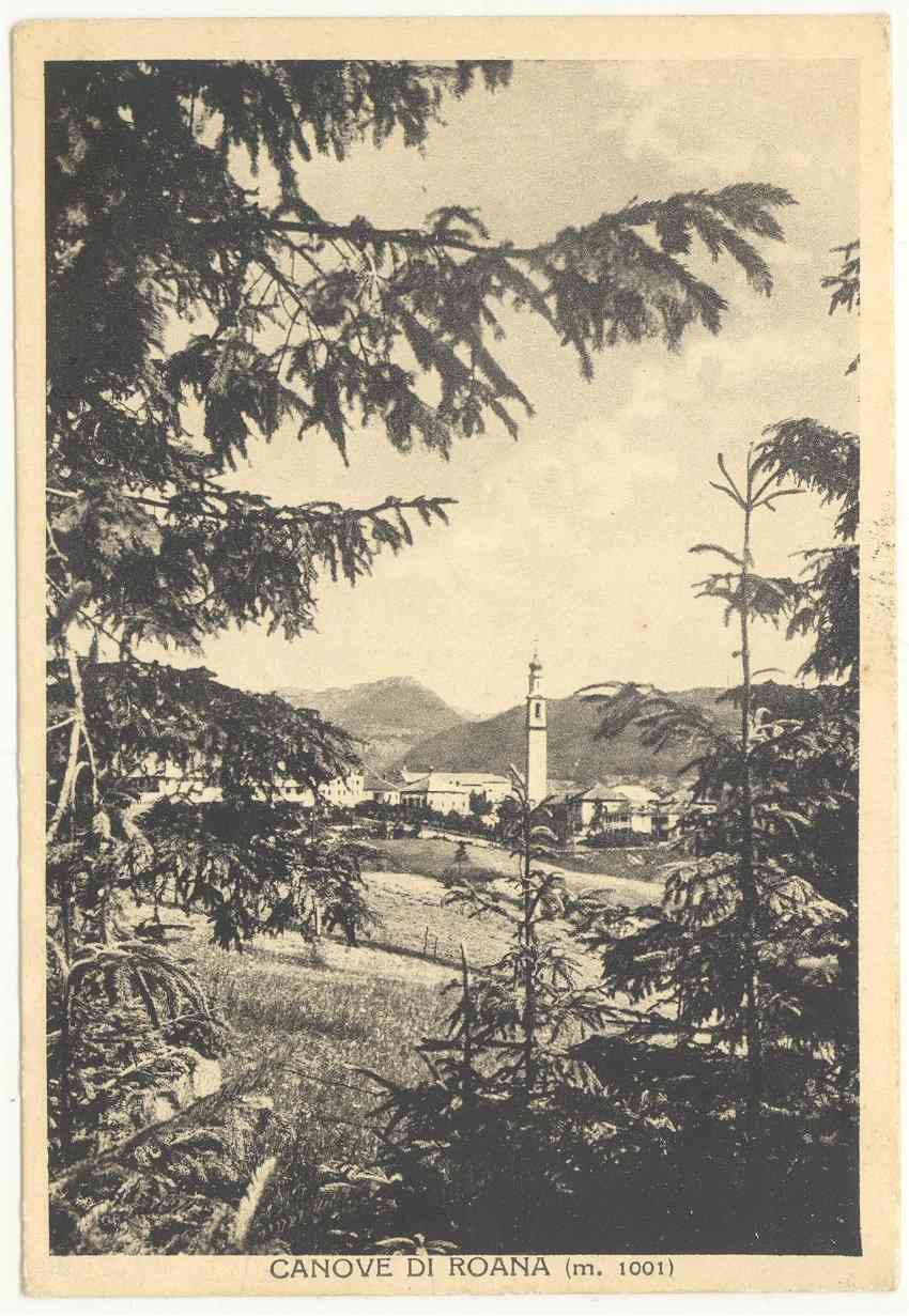 VI Canove di Roana m.1001